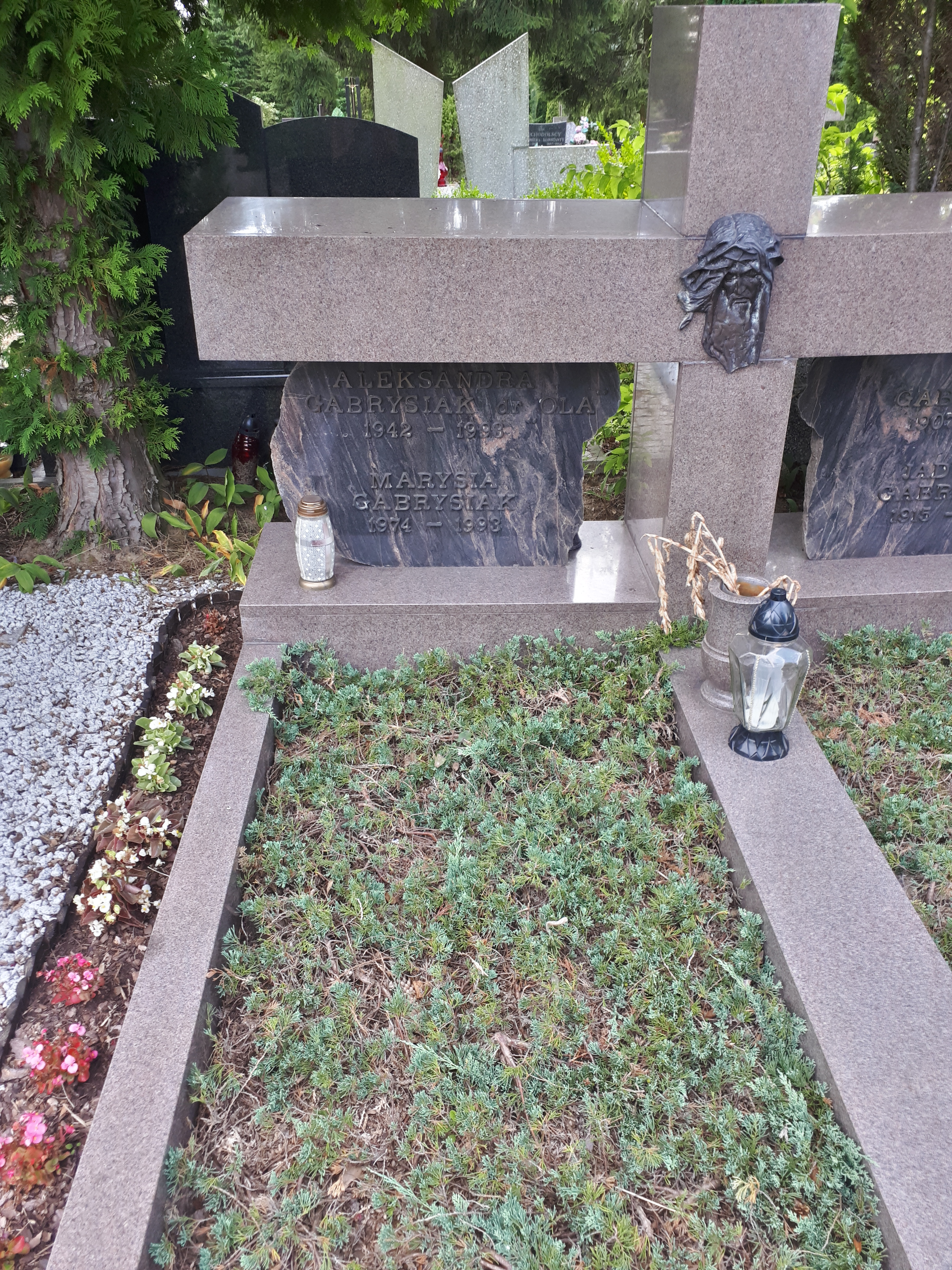 Grób Aleksandry Gabrysiak na cmentarzu komunalnym Dębica